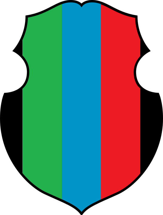 Scudo Polacco.